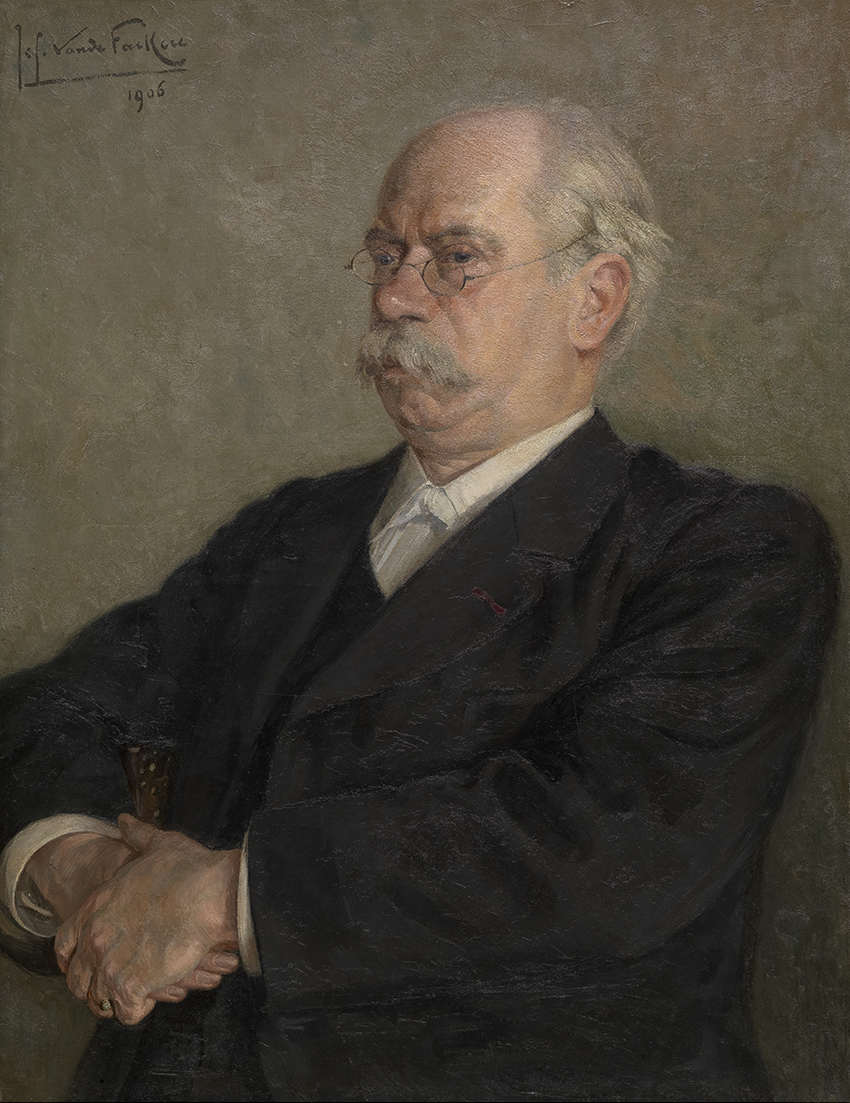 Portret van Julius Sabbe (Jef Van de Fackere, 1906); collection: Musea Brugge - Groeningemuseum